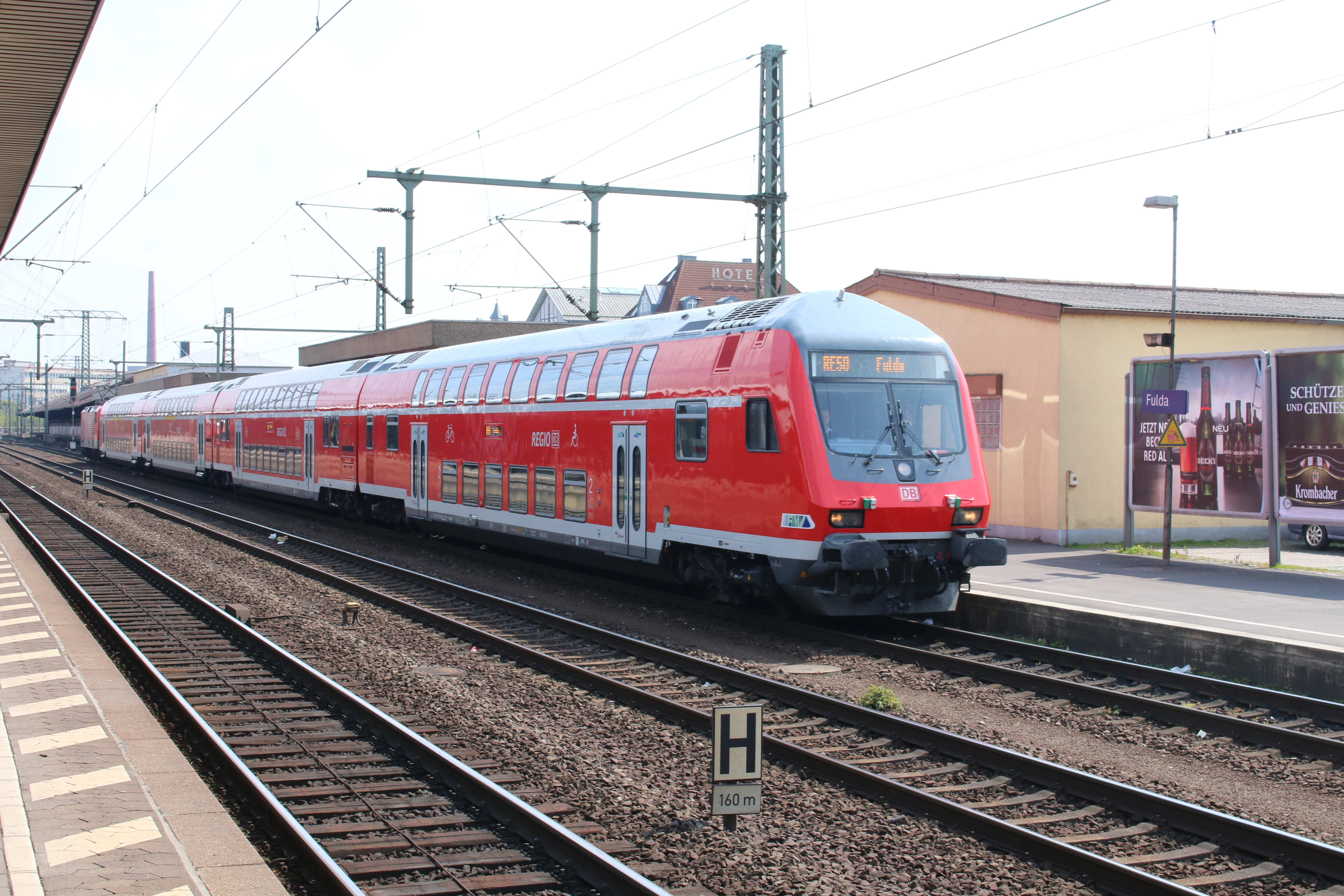 RE50 nach Fulda bei Einfahrt in den Bahnhof Fulda